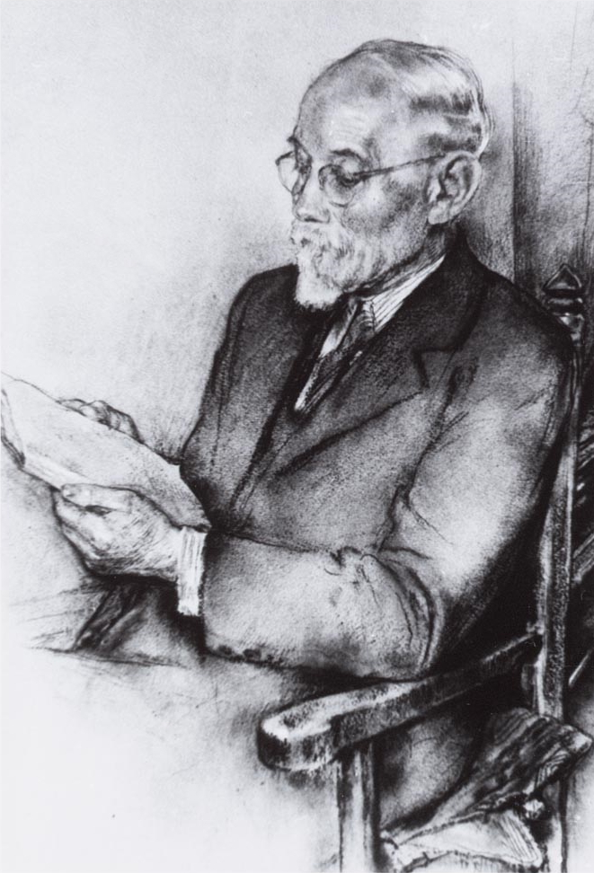 Anton Pannekoek. BG A10/807 (tekening), De Nederlandse arbeidersbeweging tot 1918, Internationaal Instituut voor Sociale Geschiedenis, Amsterdam.